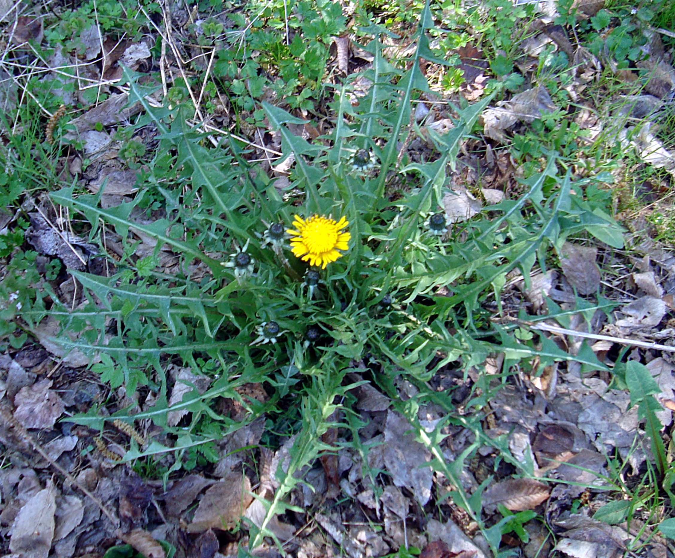 Smetanka lékařská